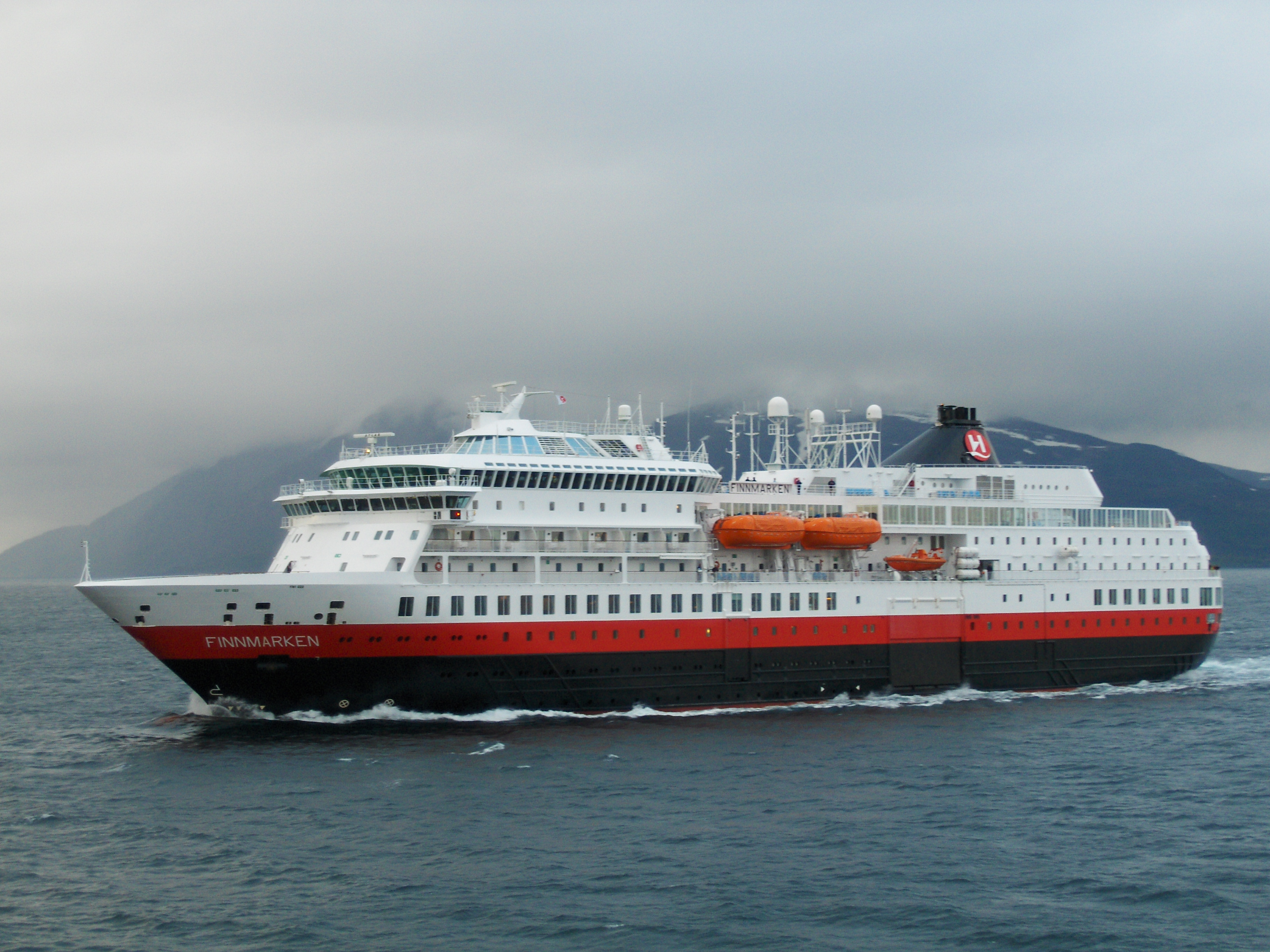 M/S Finnmarken